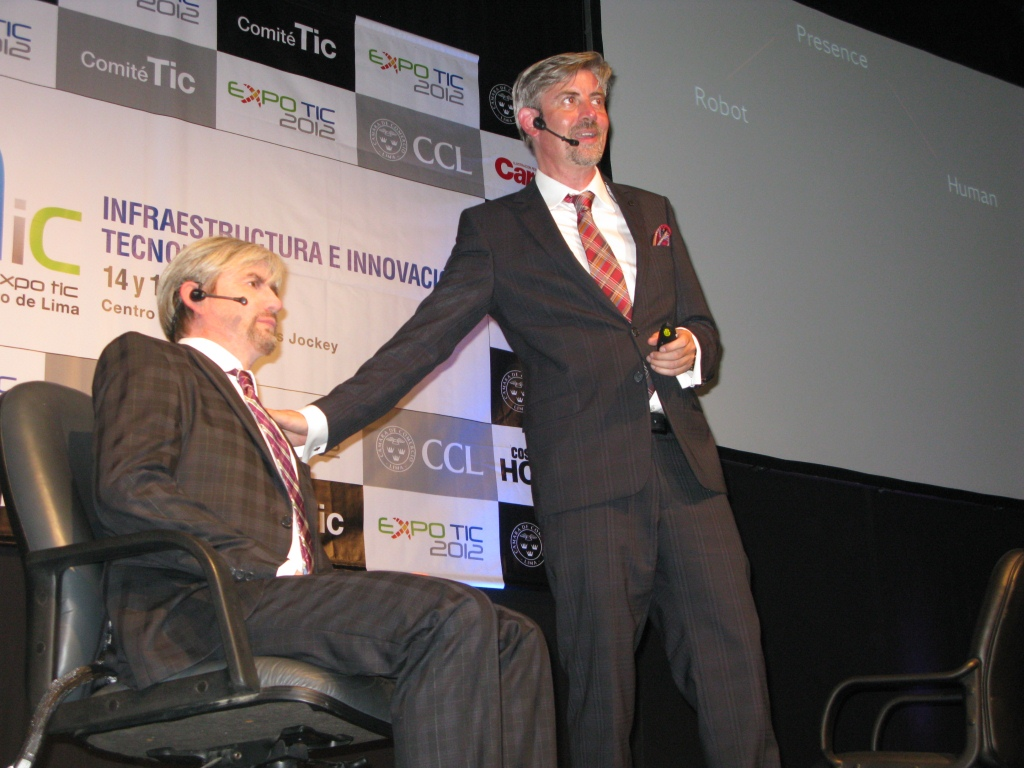 Geminoid-DK and Henrik Schärfe at ExpoTIC 2012 in Lima, Peru.